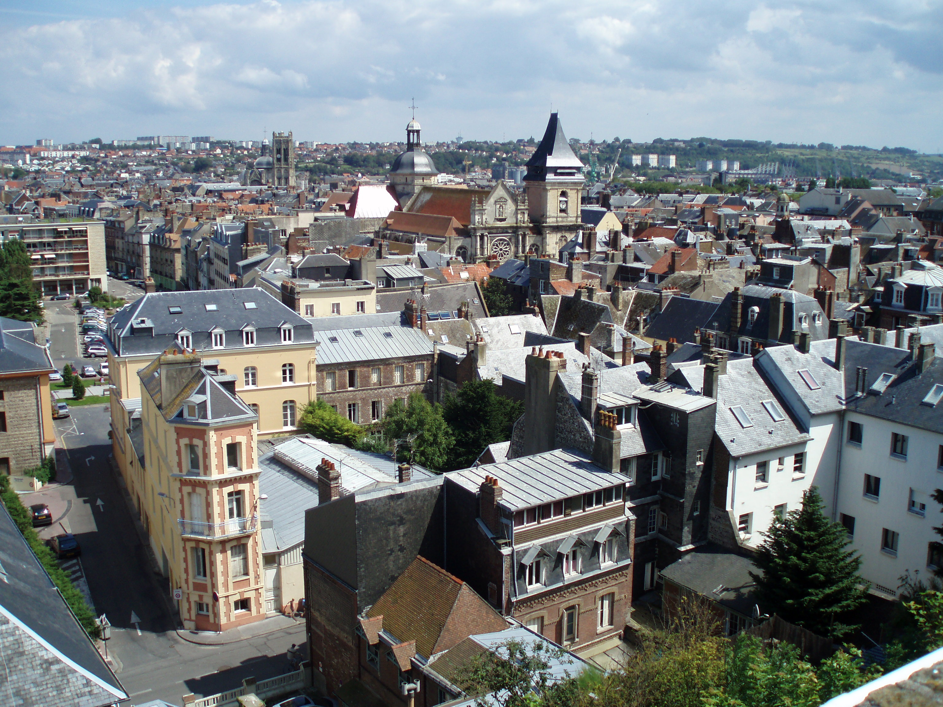 Vue sur le centre-ville de Dieppe (France) - Au centre, l'église Saint-Rémy.